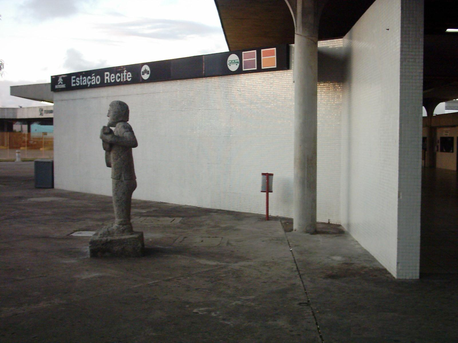 Mapa da entrada da Estação Recife, do Metrô da cidade do Recife.